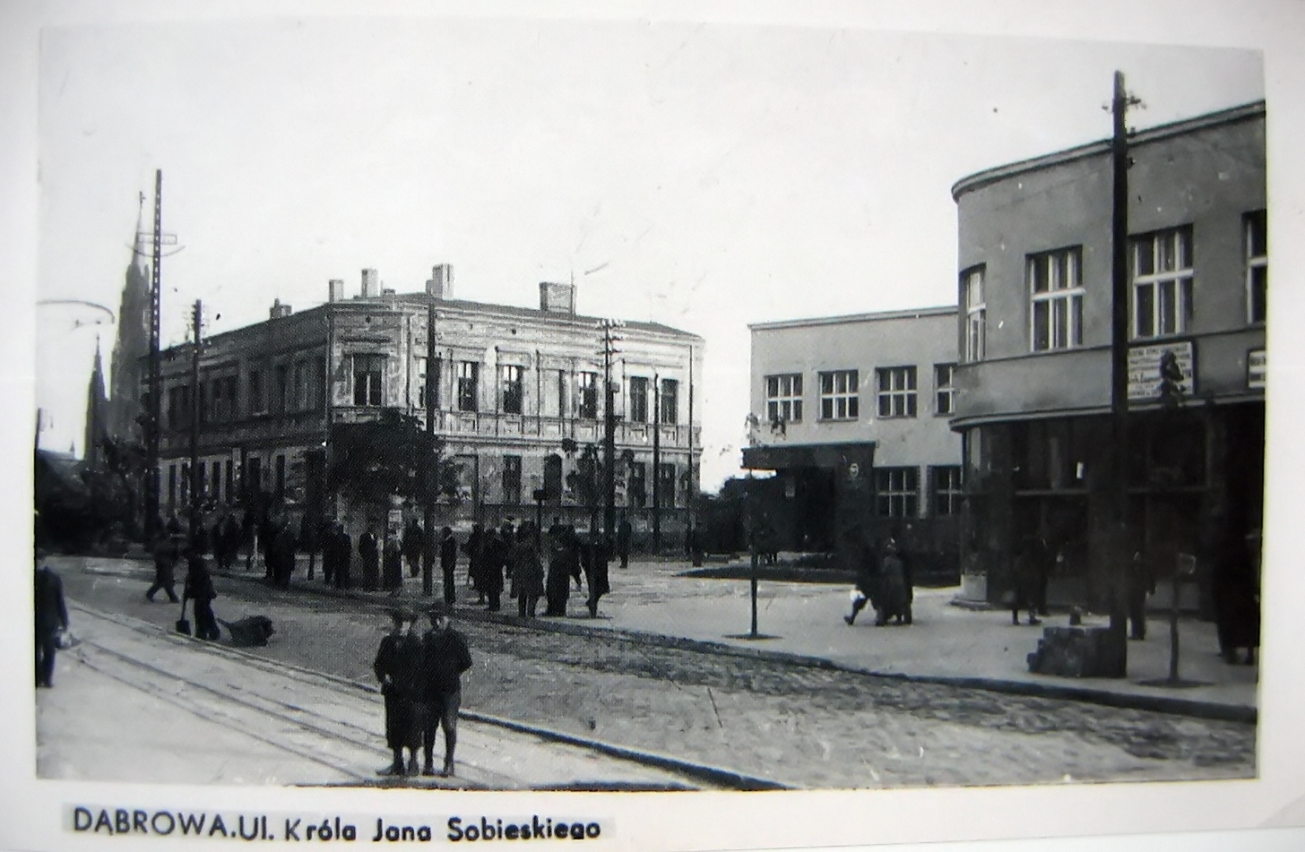 ul. Sobieskiego w Dąbrowie Górniczej. Widoczny po środku gmach poczty i nieistniejący dziś budynek po lewej.